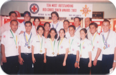 TORCY 2003 Awardees